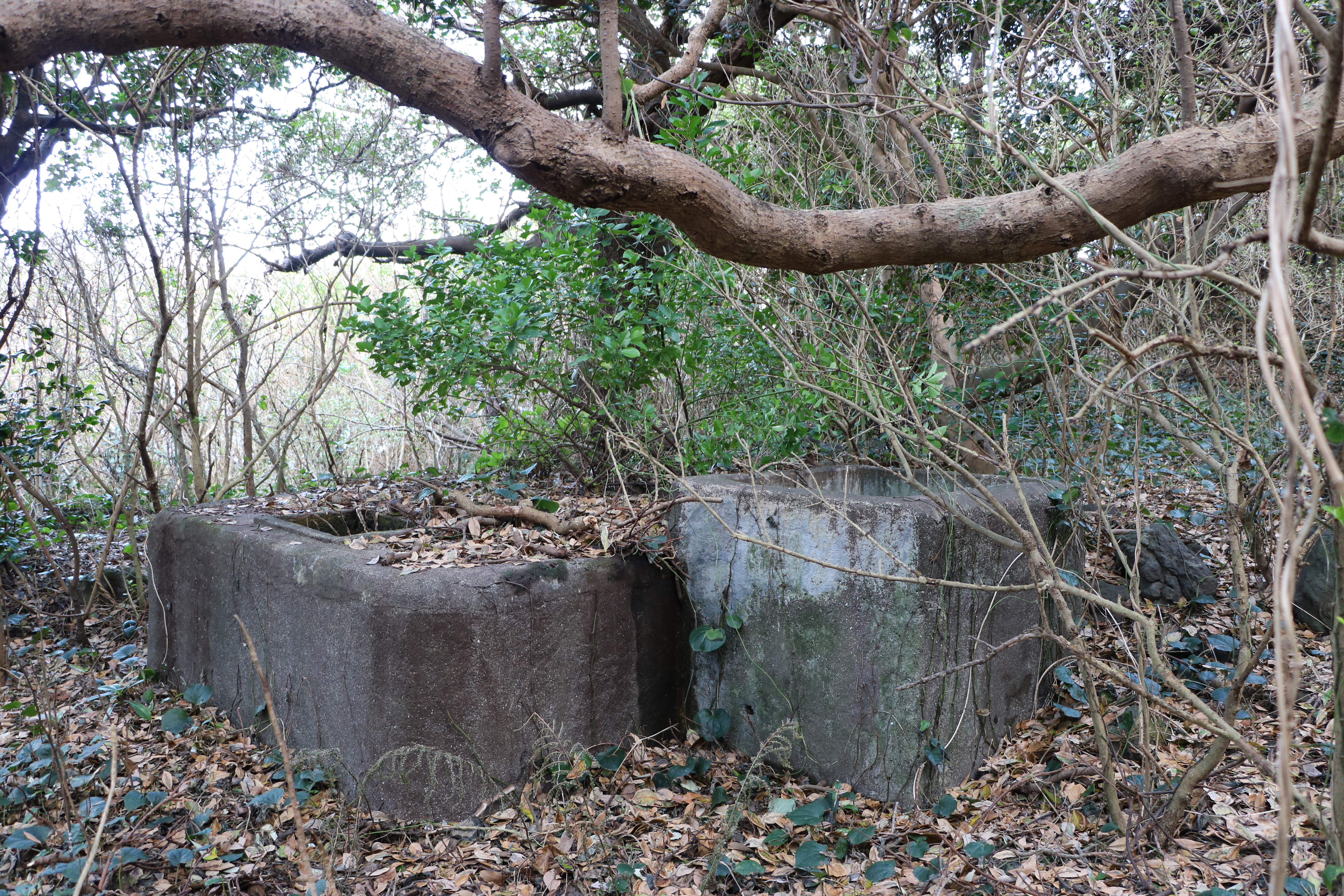 八丈小島鳥打地区の天水タンク跡（東京都八丈町）